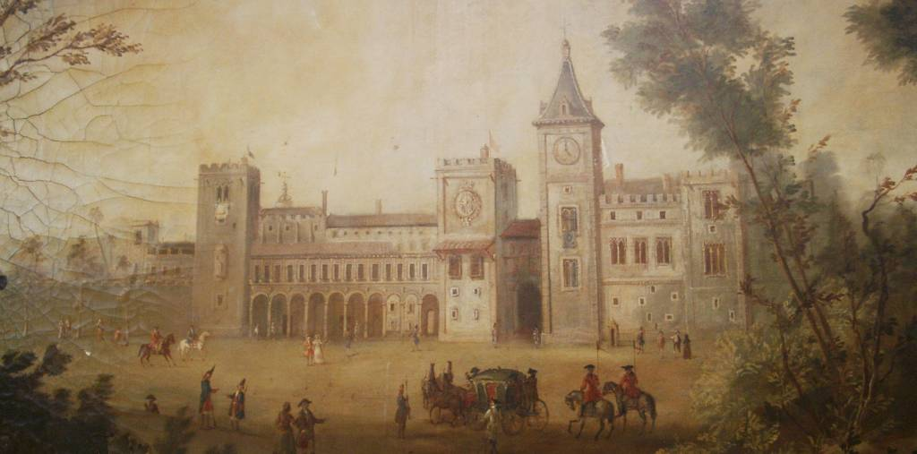 Quadre anònim on es representa el Palau Reial de València, o del Real, s.XIX.